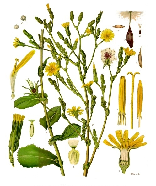 Gift-Lattich. A B Pflanze in natürl. Grösse; 1 noch nicht entfaltete Blüthe, vergrössert; 2 Blüthe im Längsschnitt desgl.; 3 einzelnes Blüthchen, desgl.; 4 Staubgefässe mit zu einer Röhre verwachsenen Staubbeuteln desgl.; 5 einzelnes Staubgefäss, desgl.; 6 Pollen unter Wasser, desgl.; 7 Griffel mit den Narben, desgl.; 8 u. 9 Fruchtknoten, von verschiedenen Seiten, stark vergrössert; 10 Frucht in natürl. Grösse; 11 dieselbe vergrössert; 12 u. 13 dieselbe im Längs- und Querschnitt.